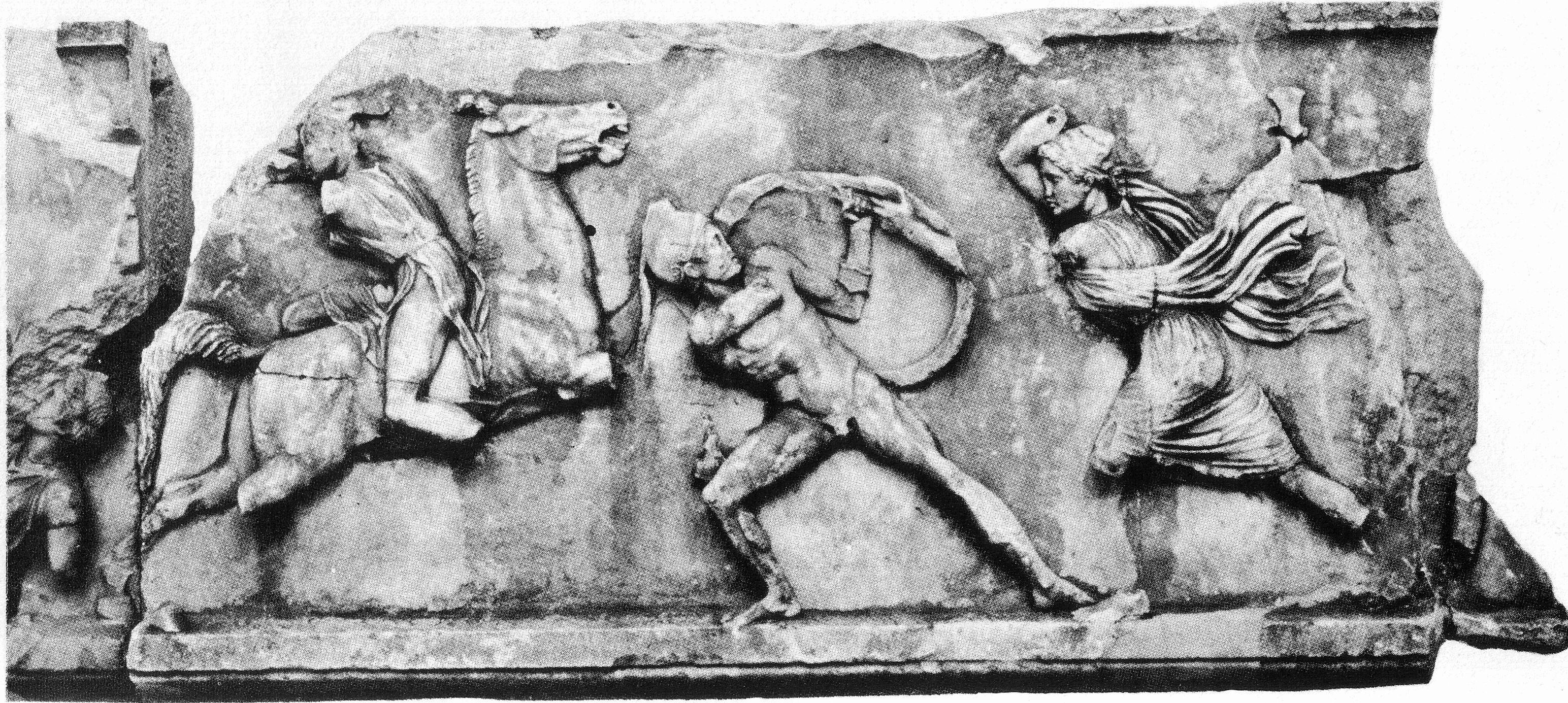 Amazones Halicarnassus Carië 4e eeuw v. Chr.